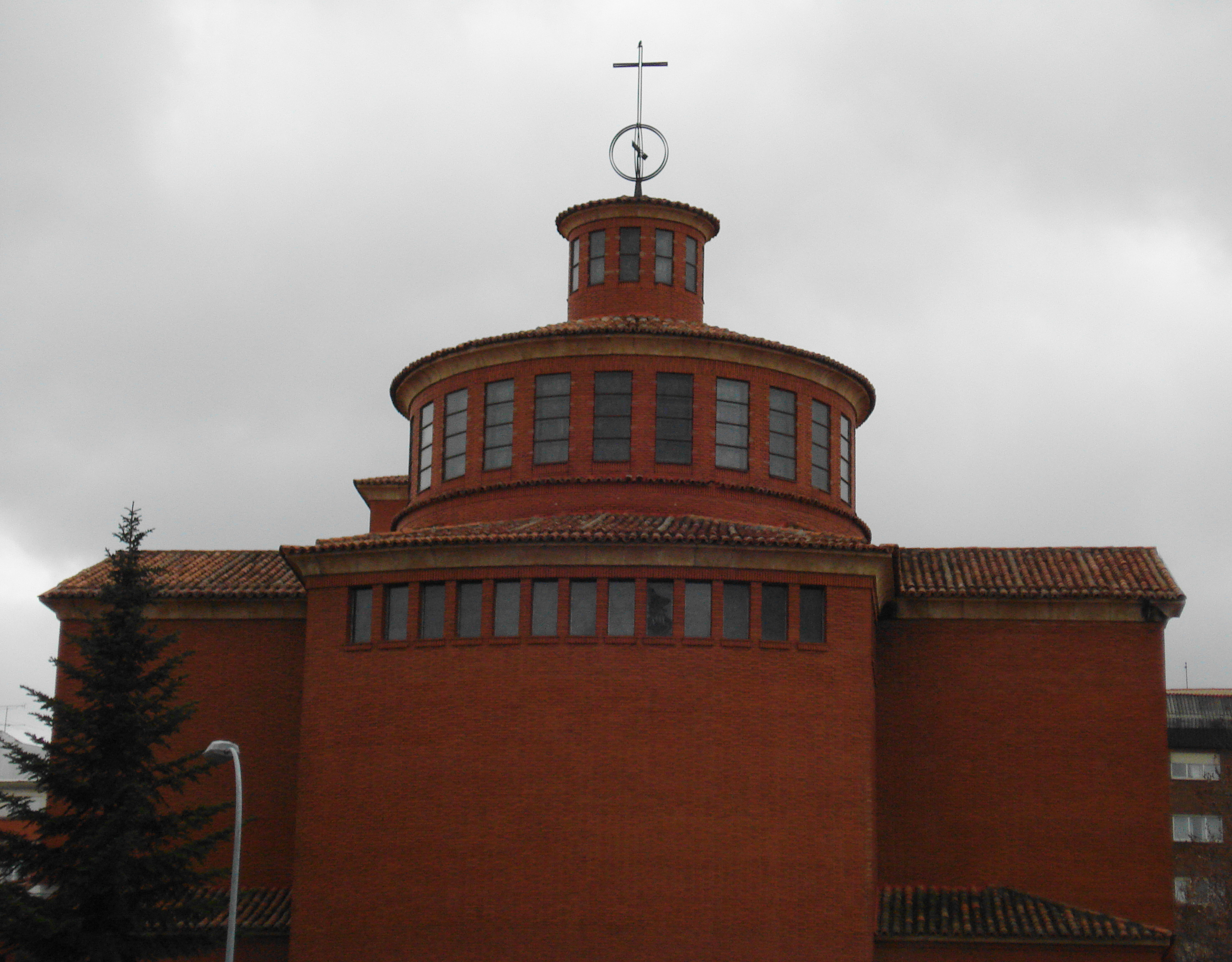 Cimborrio y ábside de la palentina Iglesia de San José